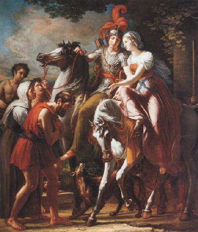 La partenza di Angelica e Medoro, olio su tela, 267 x 228 cm, collezione privata